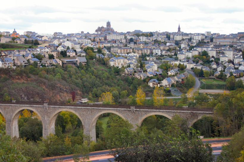 Rodez sur son "piton", côté sud-sud-ouest, vu de la vieille route d'Olemps - au premier plan: viaduc de la ligne de Toulouse enjambant la vallée de l'Aveyron et rocade devenue boulevard urbain.